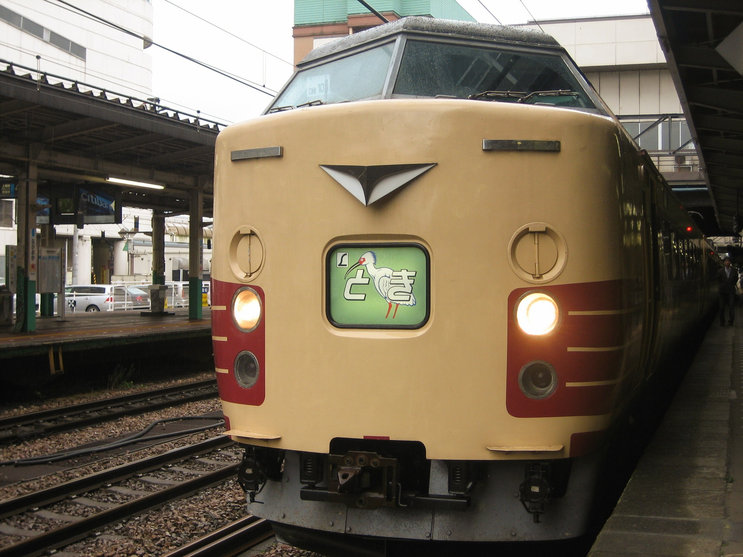 長岡駅2番線ホームに停車中の特急とき号（イベント列車）